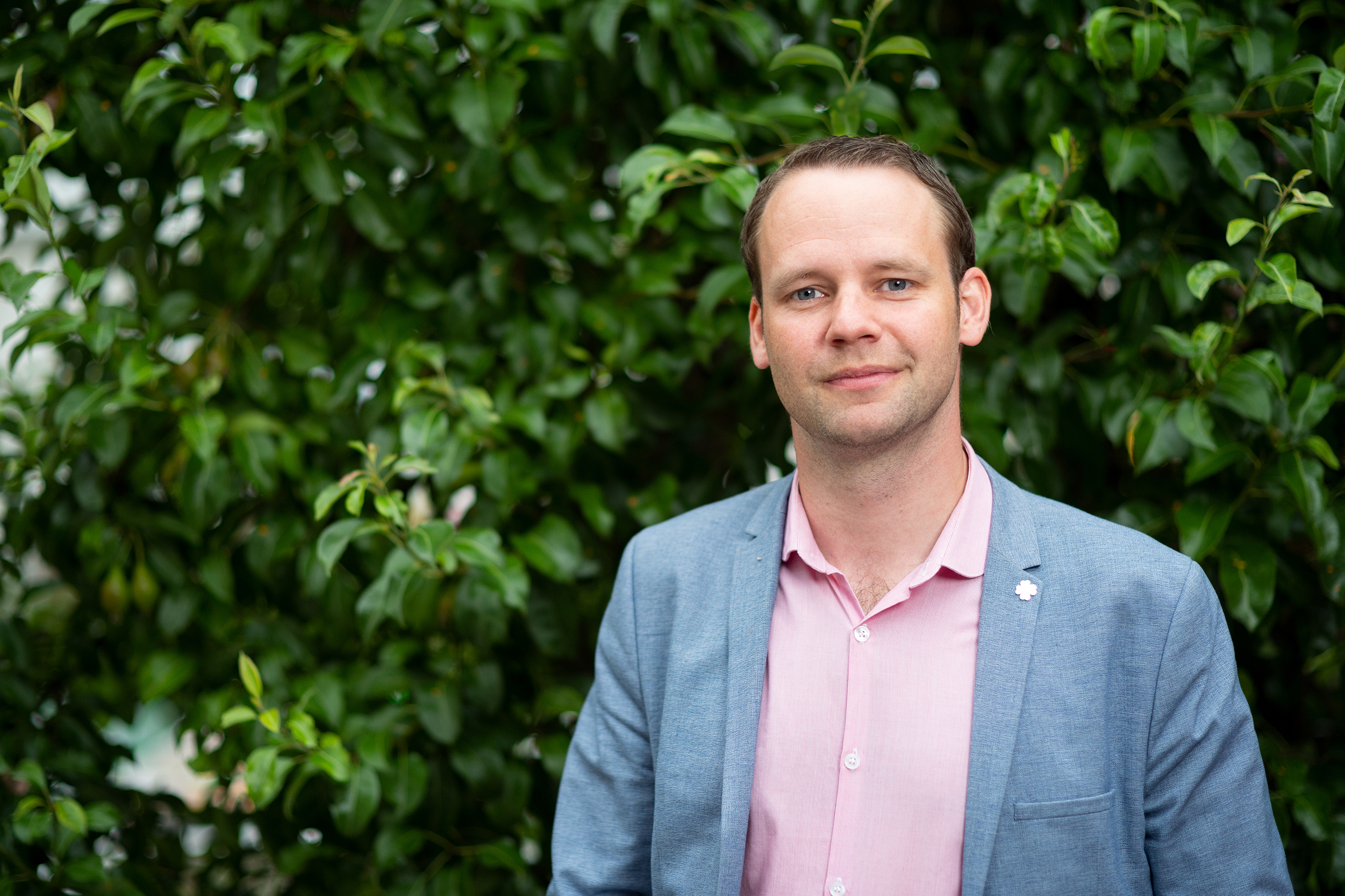 Rickard Nordin, Riksdagsledamot för Centerpartiet.